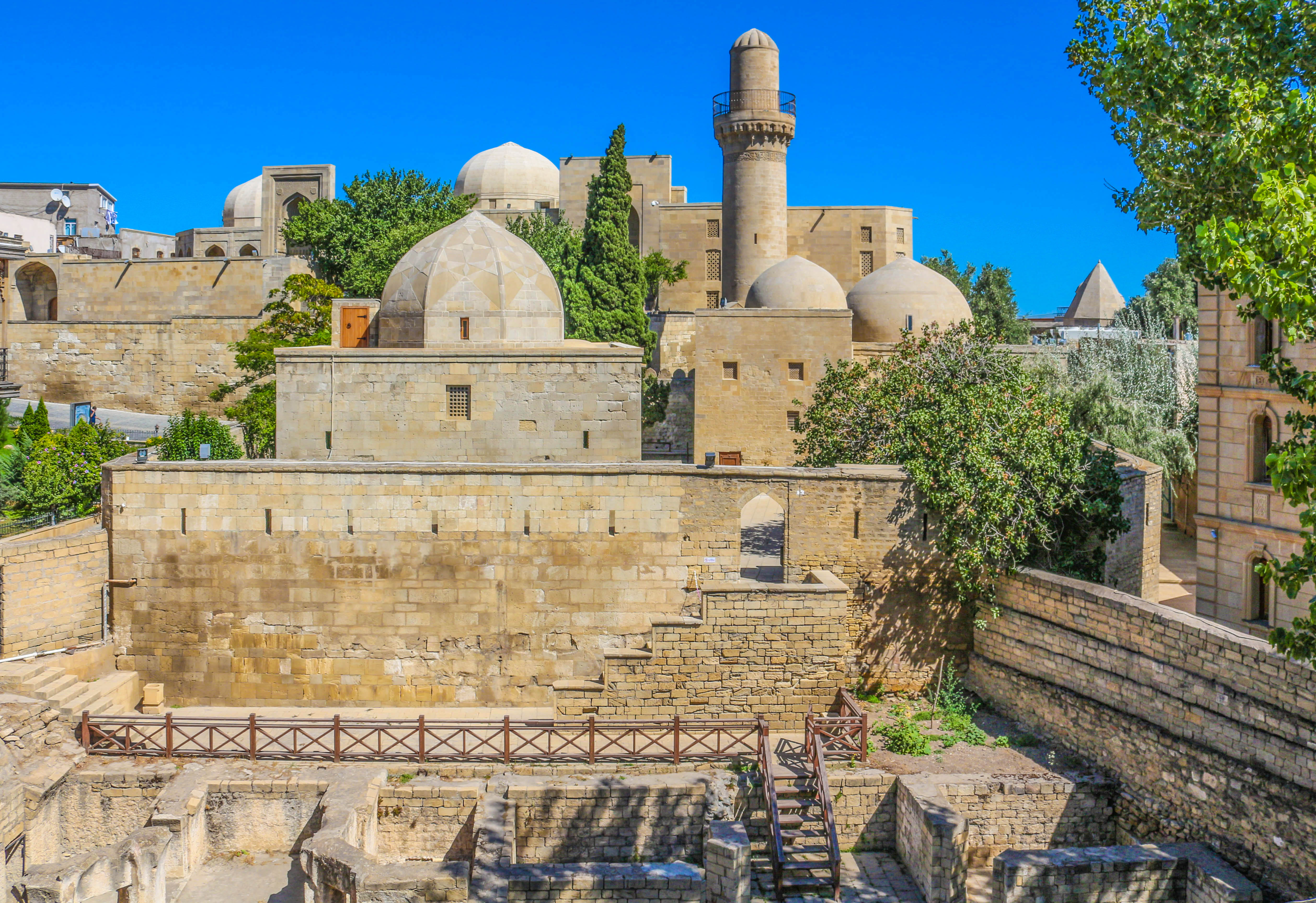 Şirvanşahlar saray kompleksi